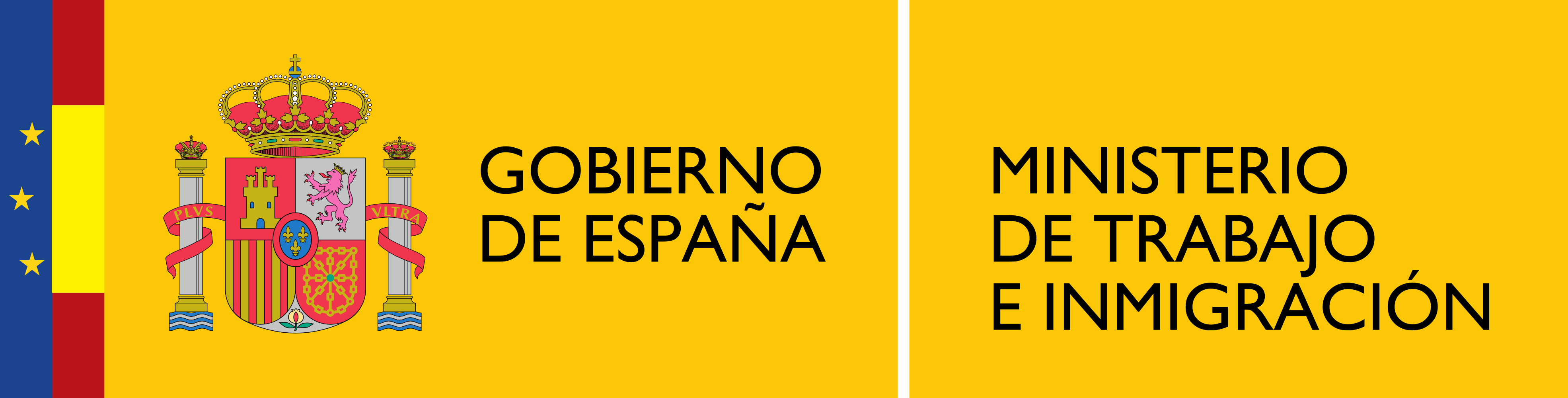 Logotipo del Ministerio de Trabajo e Inmigración